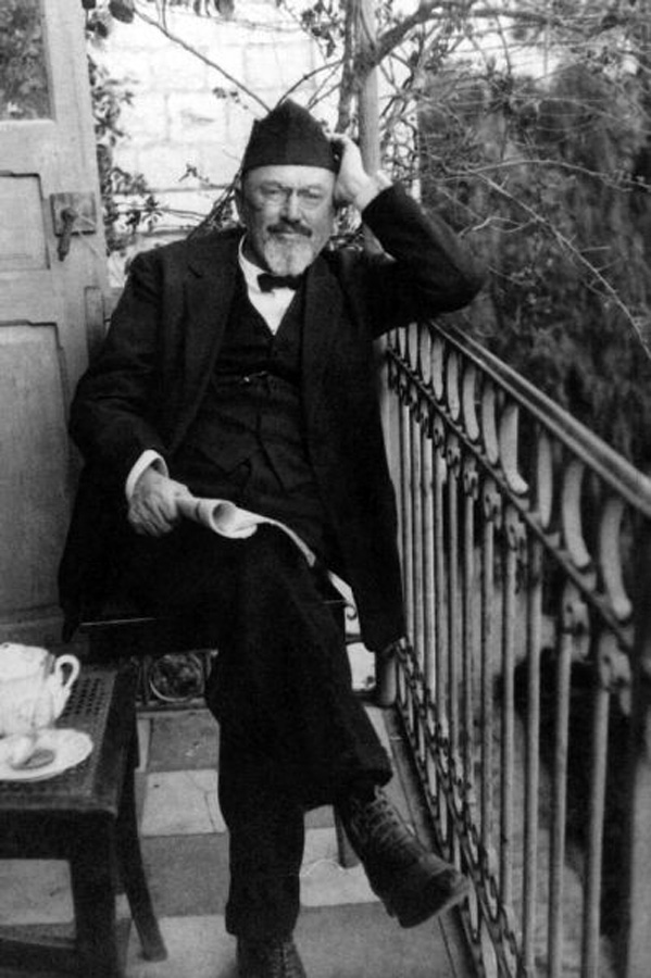 נפתלי וייץ